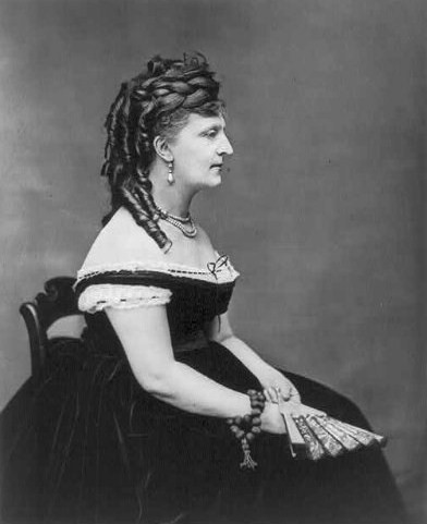 Ольга Катакази, ур. Фитц-Джеймс де Бервик (ум. 25.07.1905)